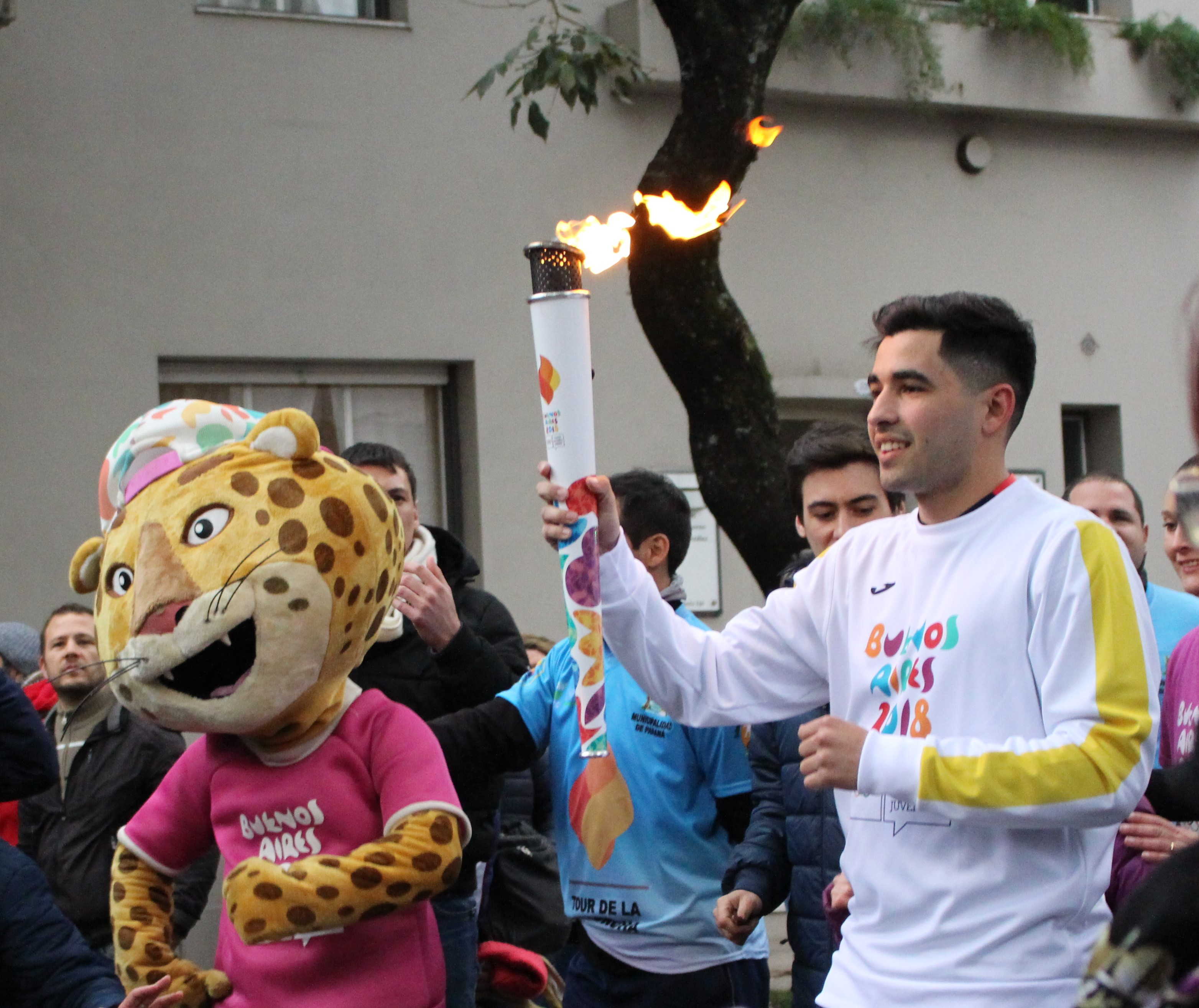 Relevo de la Antorcha Olímpica de los Juegos Olímpicos de la Juventud de Buenos Aires 2018 en la ciudad de Paraná, Entre Ríos. Luisina Desio